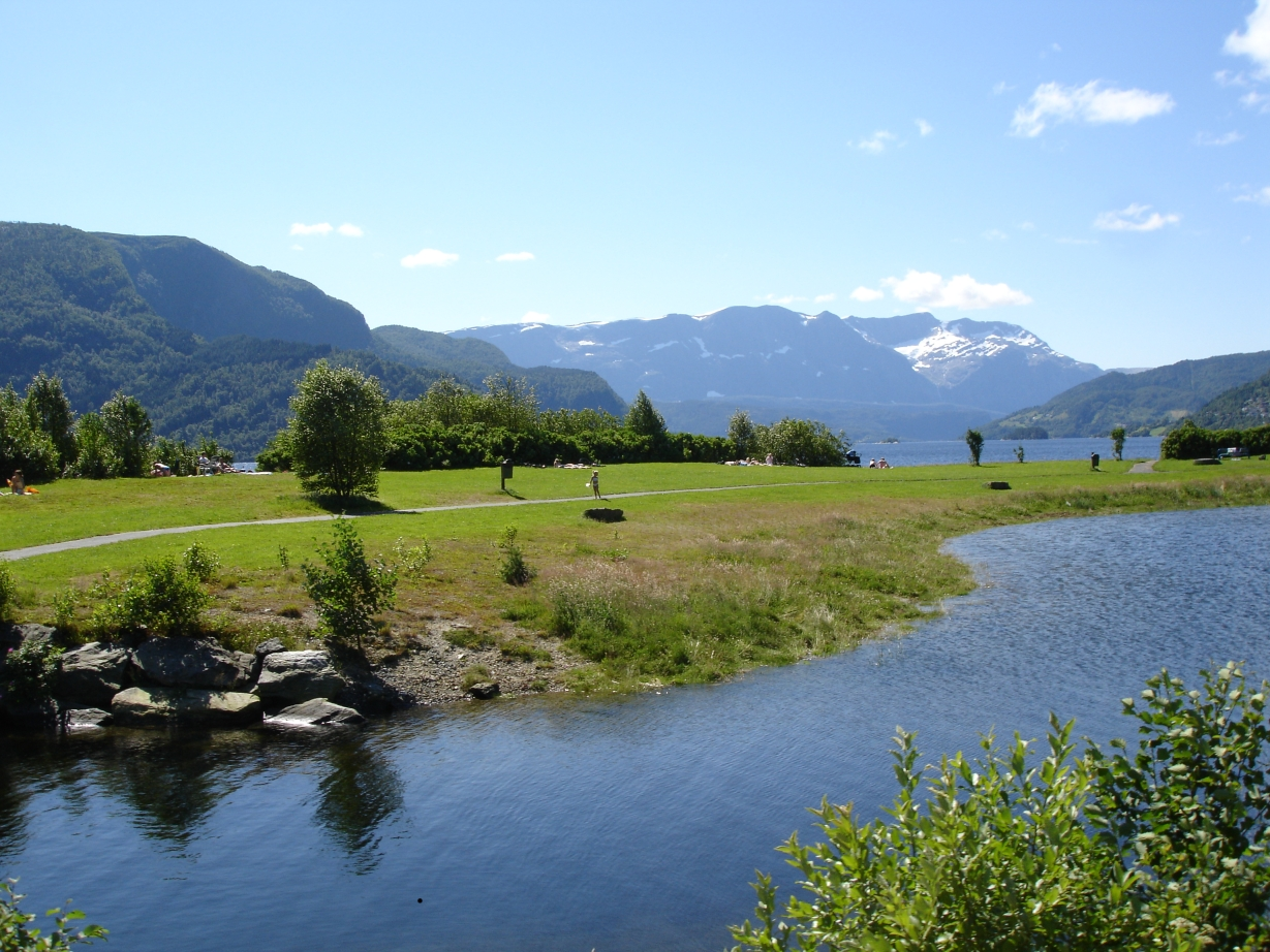 Stranda i Naustdal.